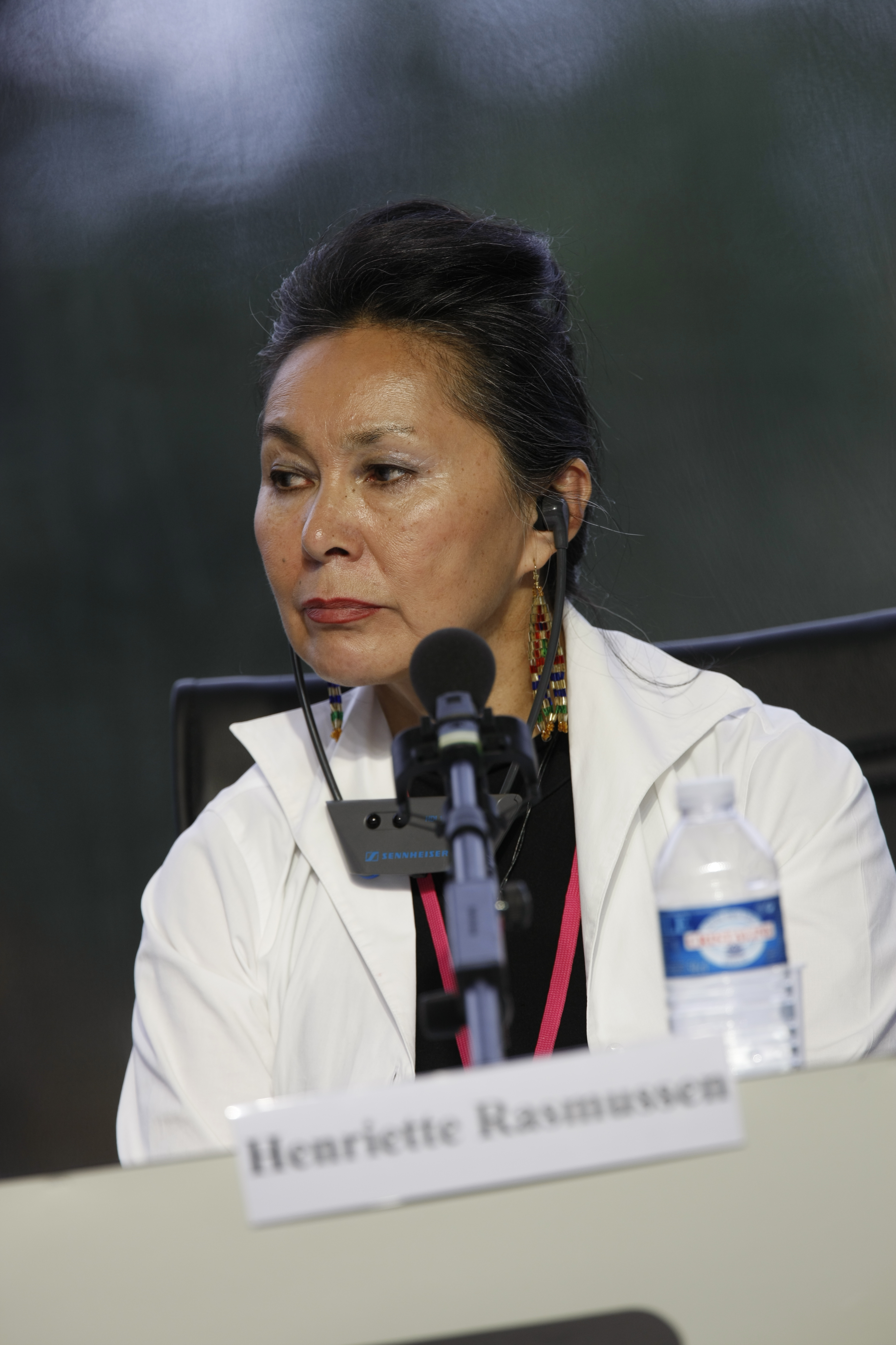 Henriette Rasmussen, ancienne ministre du Groenland à l'université d'été du MEDEF en septembre 2009.